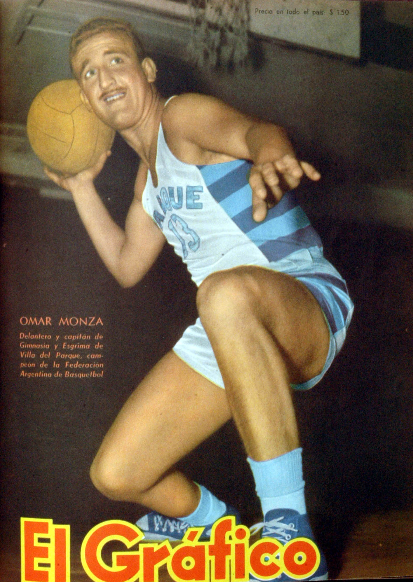 El Grafico del 01 de Febrero de 1952. Edicion 1695